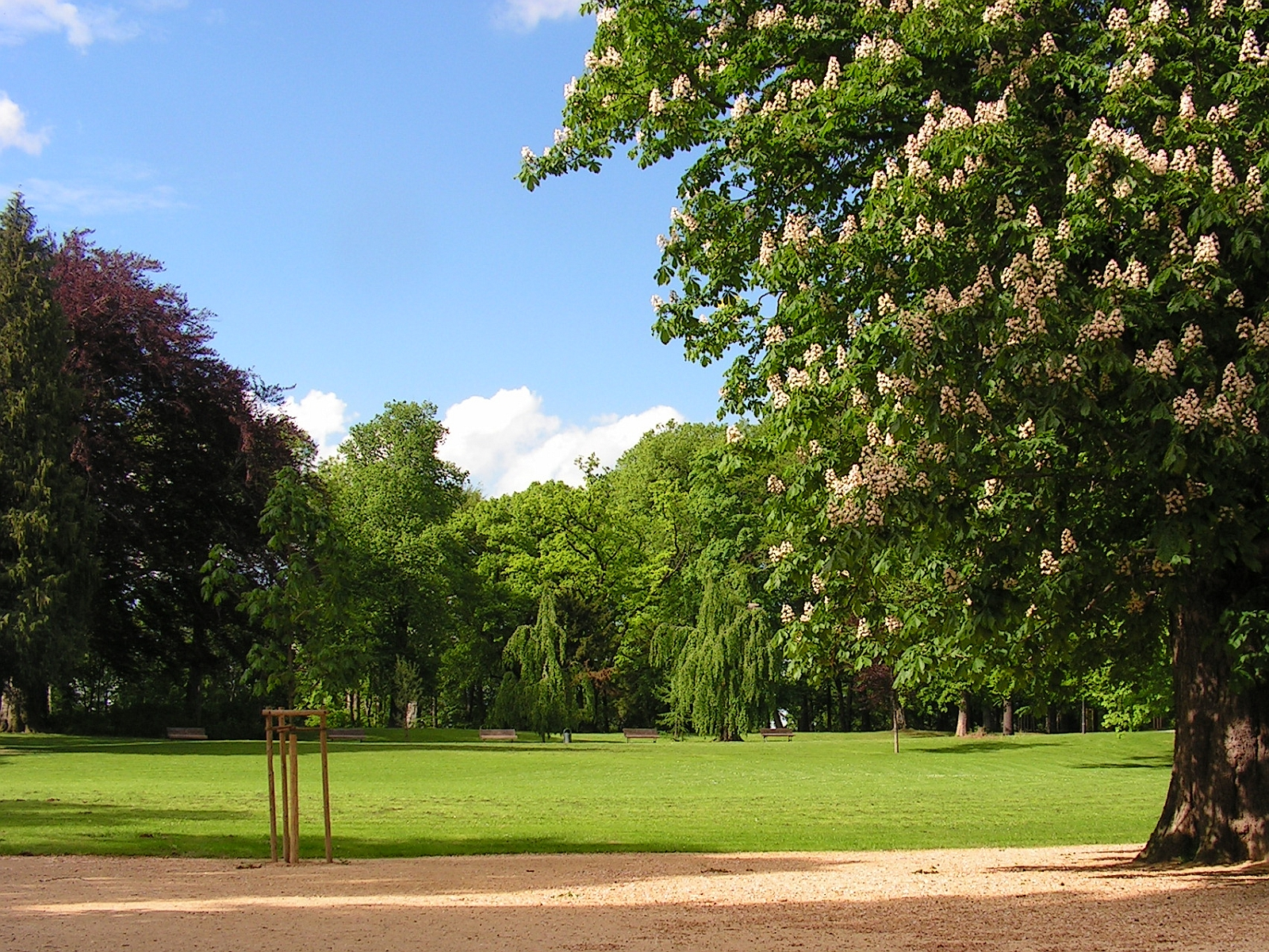 später Frühling im Lustgartens von Wernigerode im Harz Foto 2005 Wolfgang Pehlemann Wiesbaden PICT0037